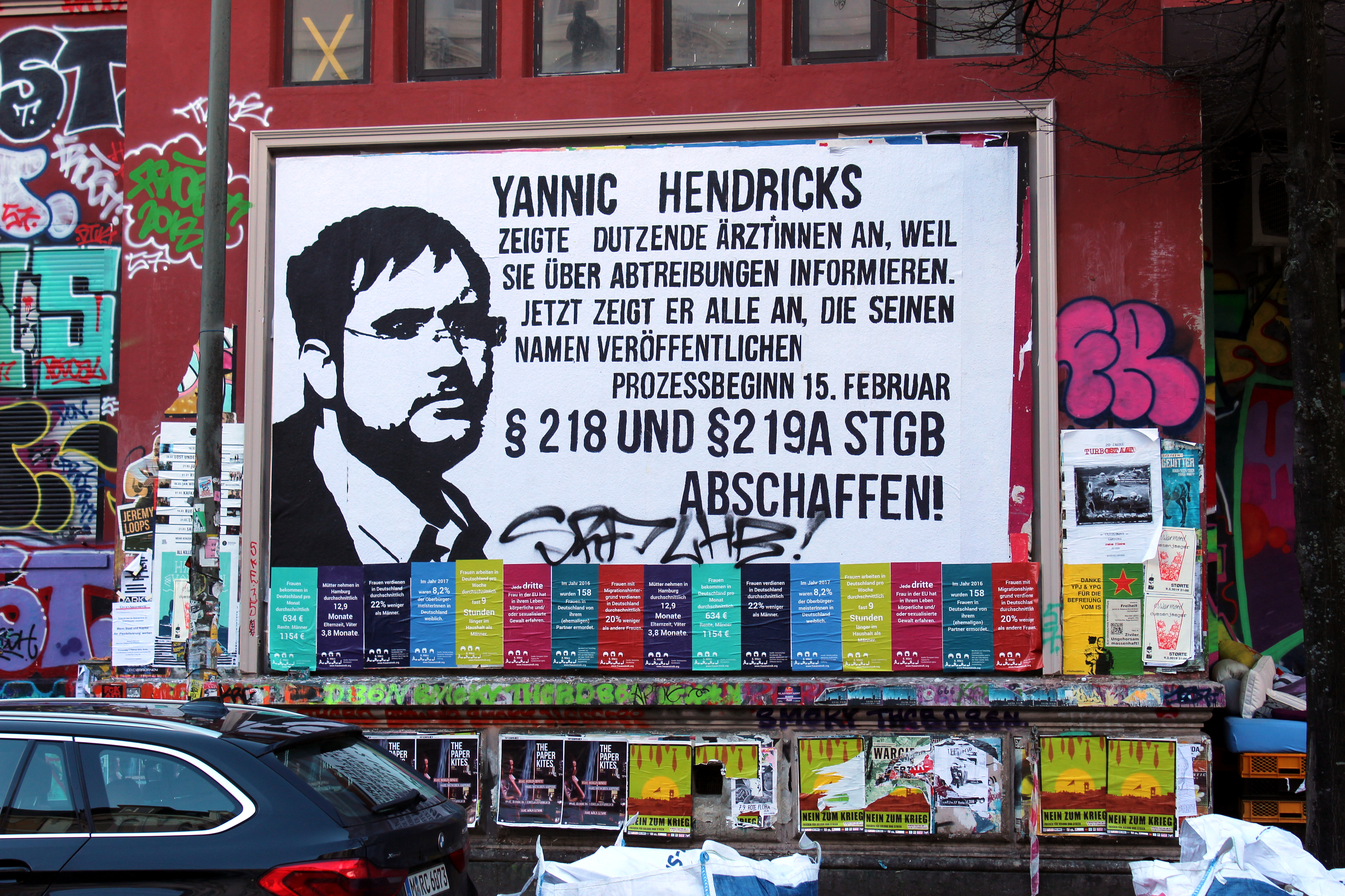 Rote Flora in Hamburg-Sternschanze mit Plakatwand zum Politaktivisten Yannic Hendricks im Februar 2019.